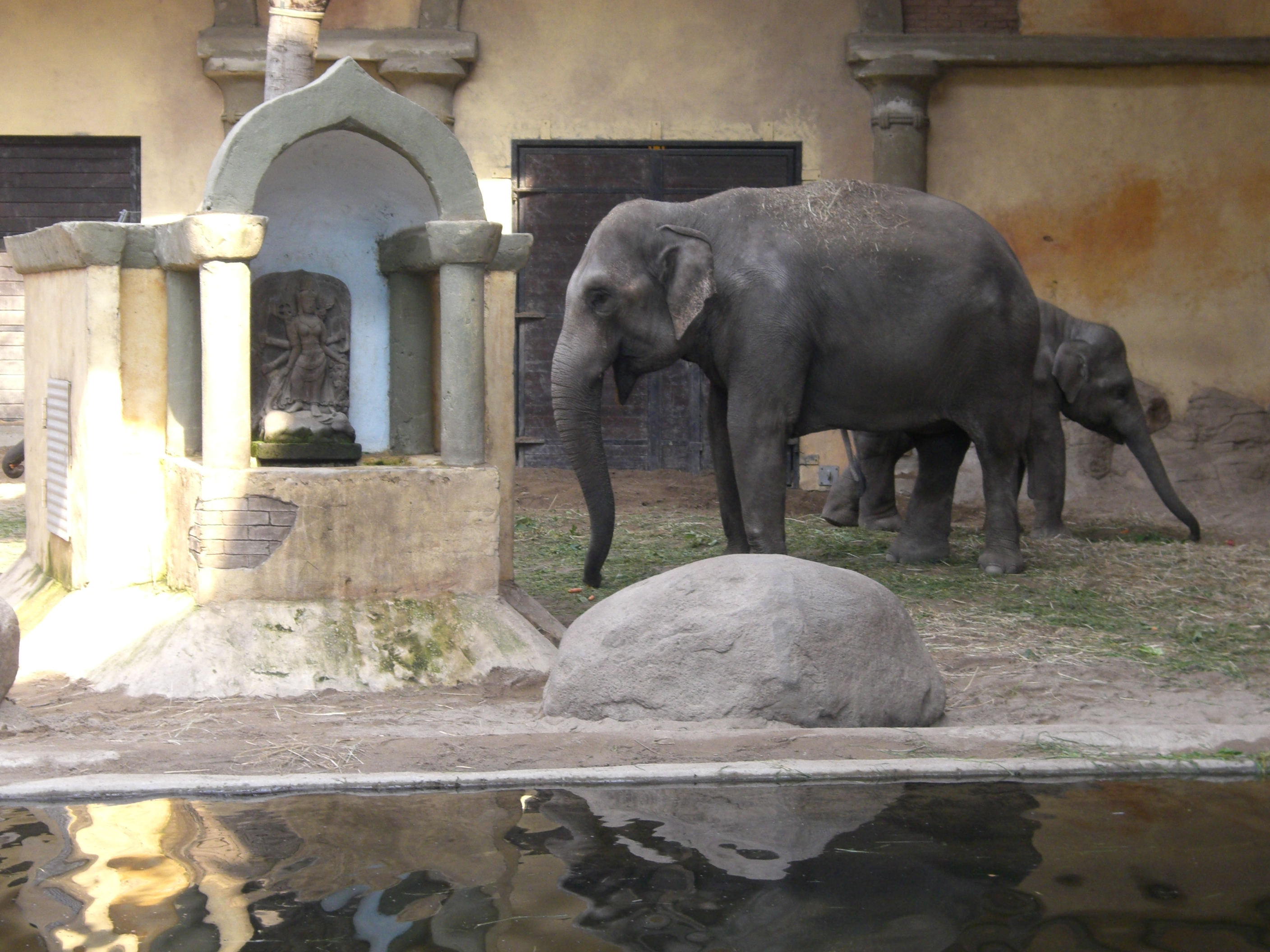 Hagenbecks Tierpark in Hamburg